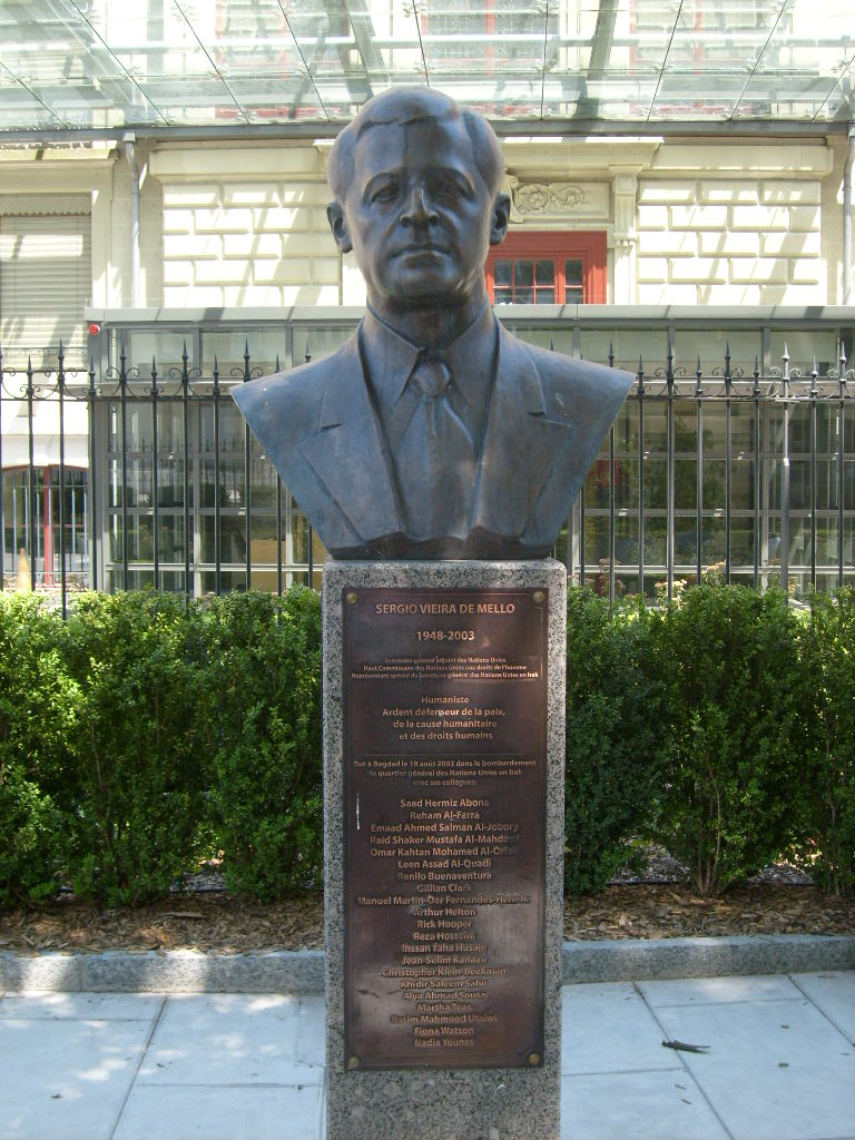 Buste de Sergio Vieira de Mello devant le Palais Wilson de Genève (Suisse)